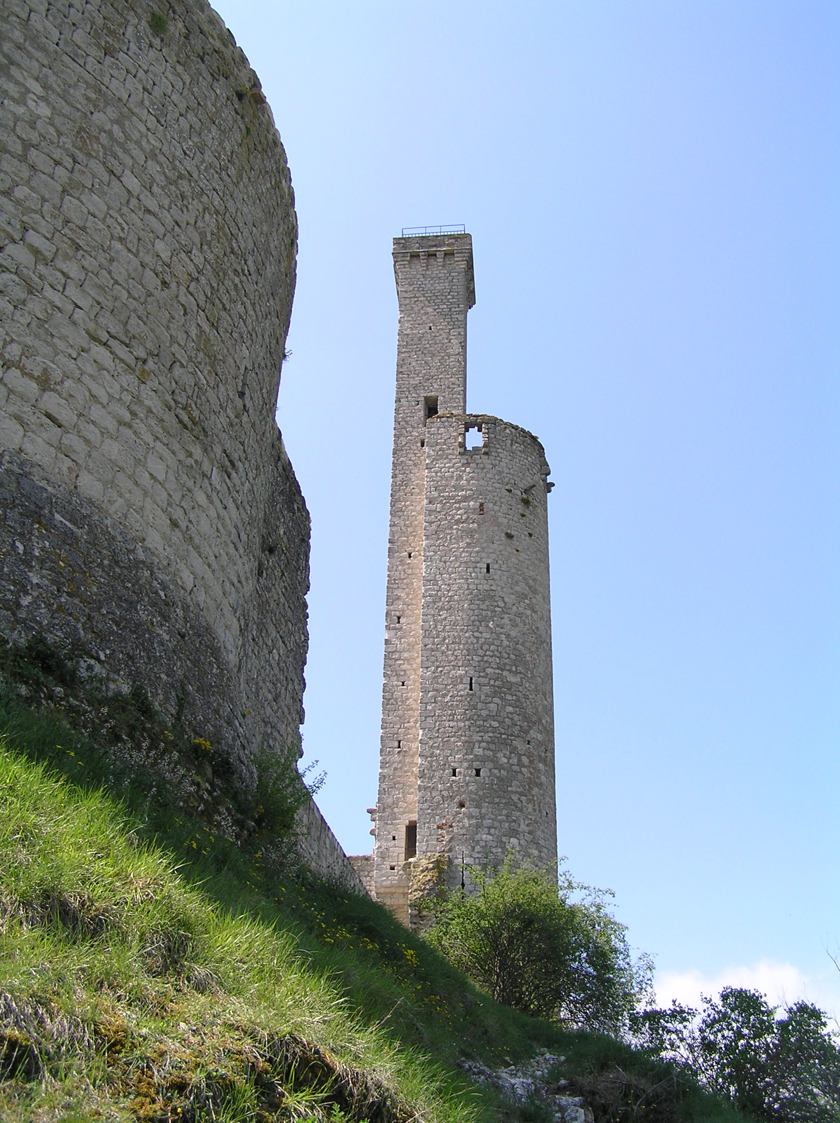 Ruines du château de Castelnau de Levis